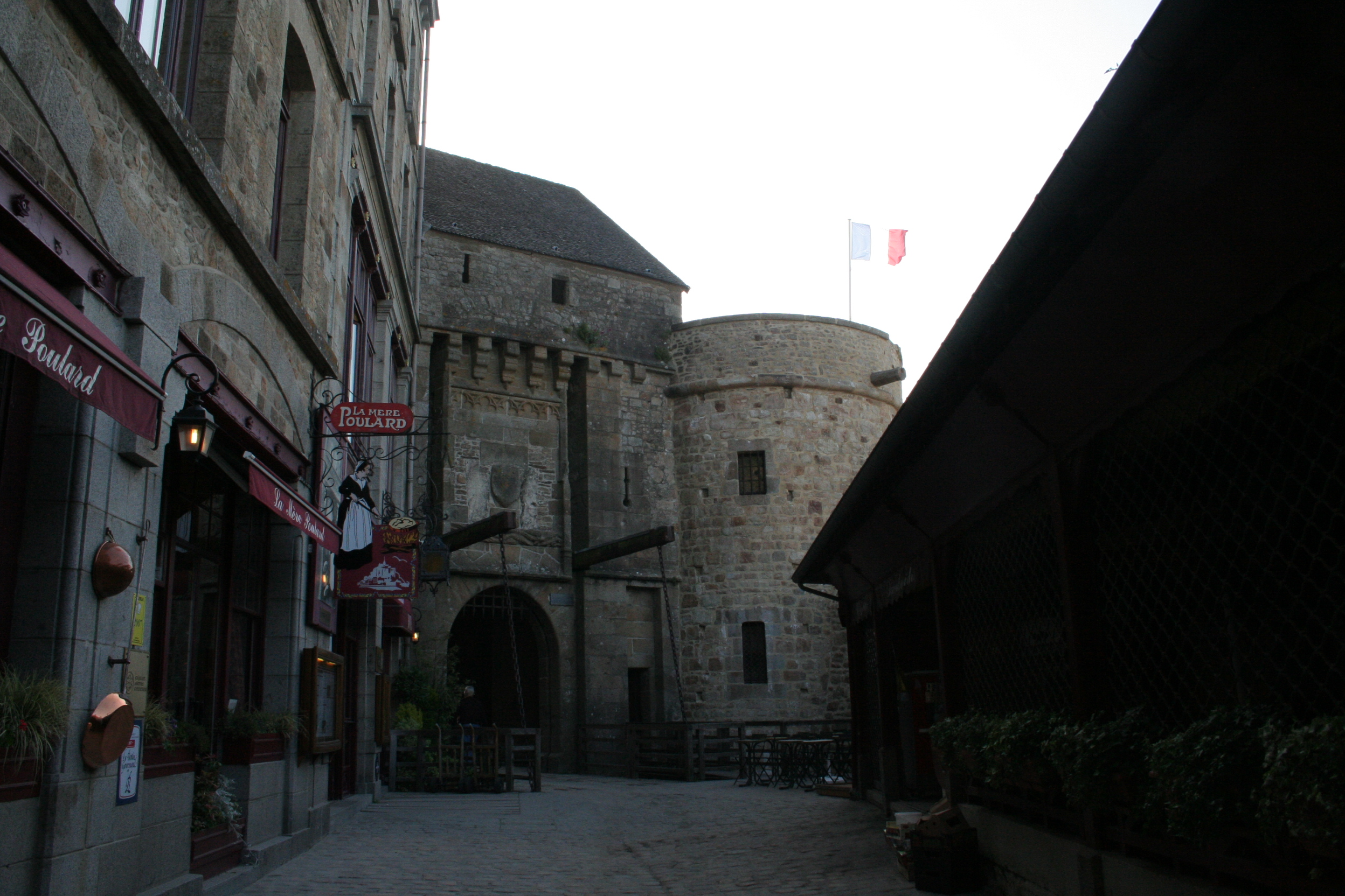 Porte et pont levis à l'entrée du Mont-Saint-Michel. La célèbre auberge de la mère Poulard.